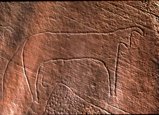 Gravure préhistorique du sud-oranais (Algérie)